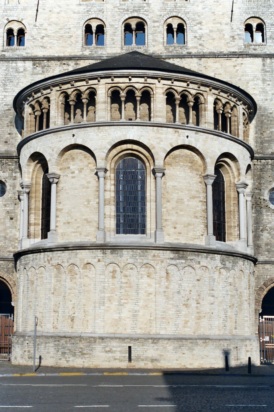 Belgique - Brabant wallon - Nivelles - Collégiale Sainte-Gertrude